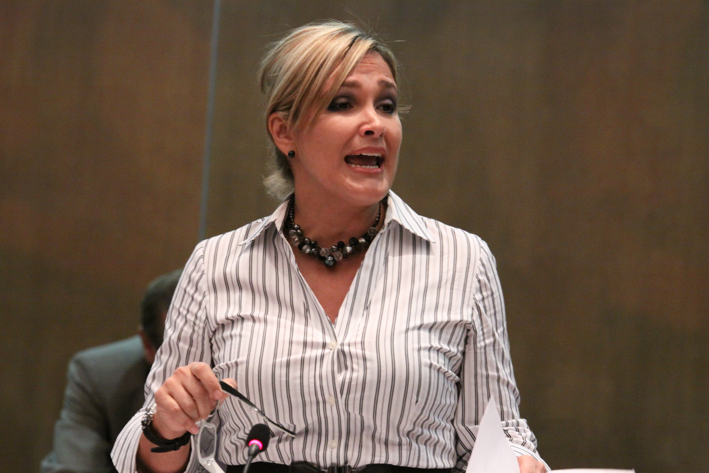 20 de Mayo de 2010